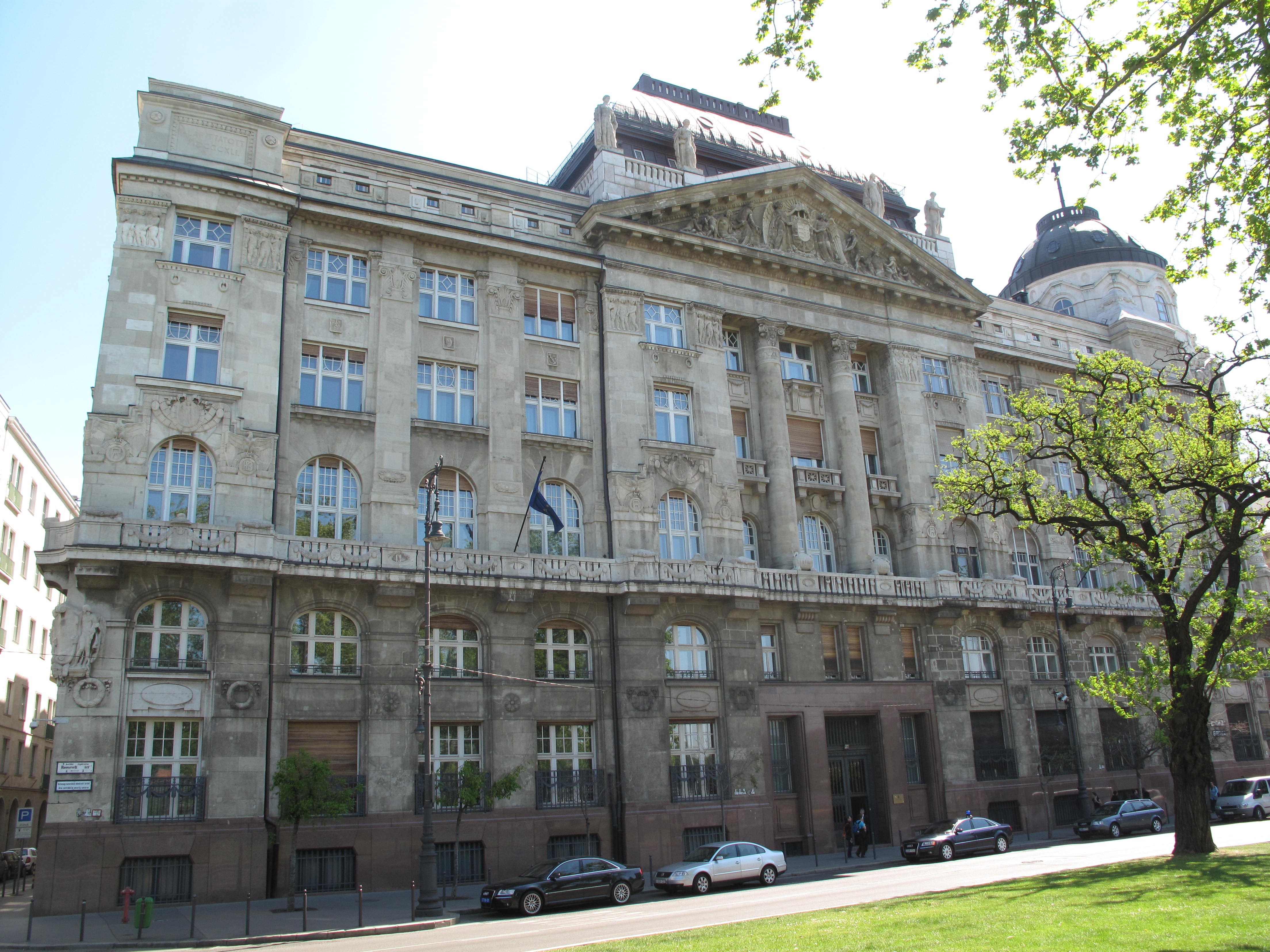 Budapešť